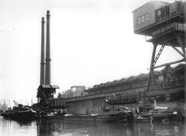 Eisenhüttenstadt, Binnenhafen Zentralbild Sturm Ti-Ho. 19 Motive 24.8.1954 Eisenhüttenkombinat "J.W.Stalin", Stalinstadt (Aufgenommen August 1954) Der Hafen.